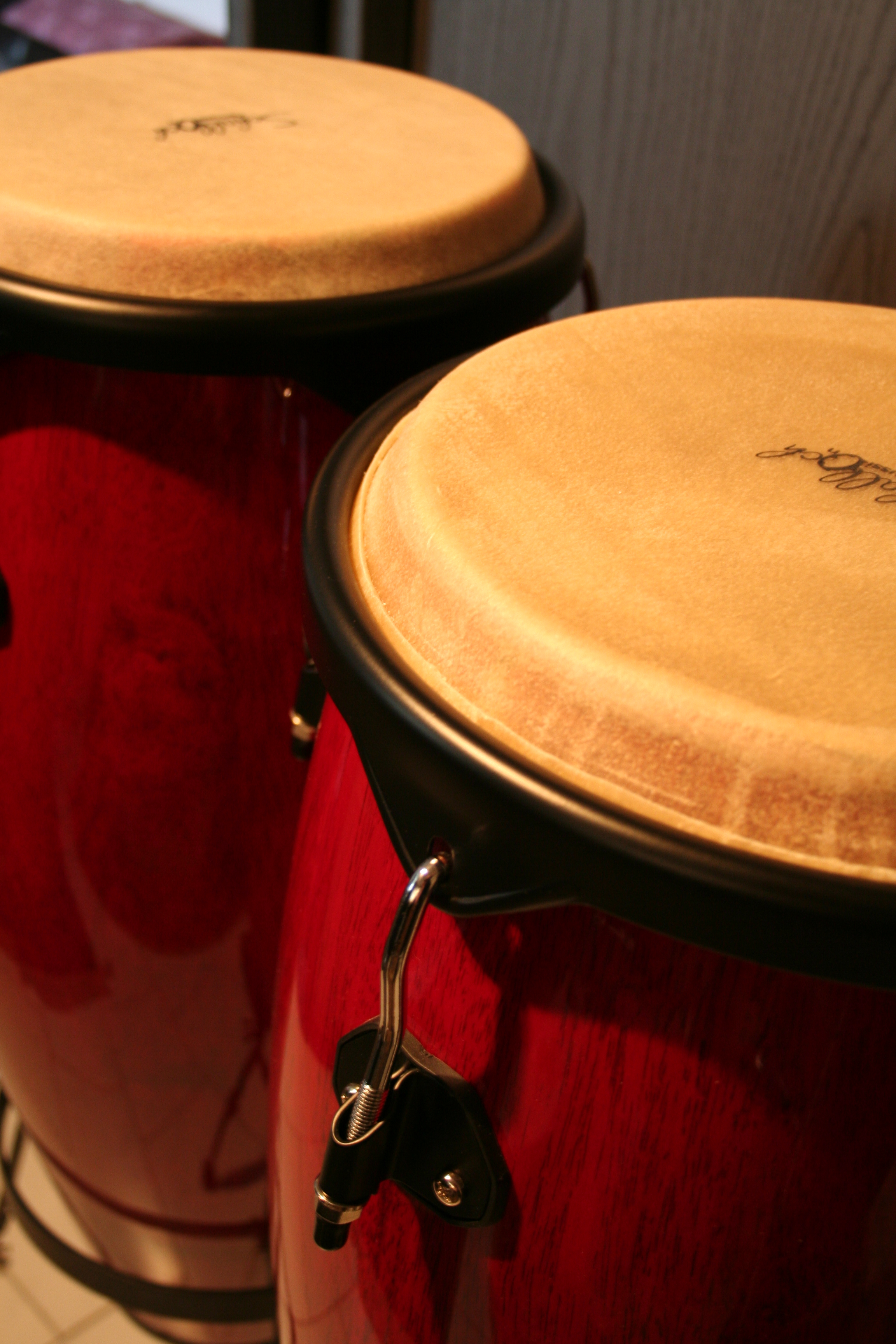 Congas